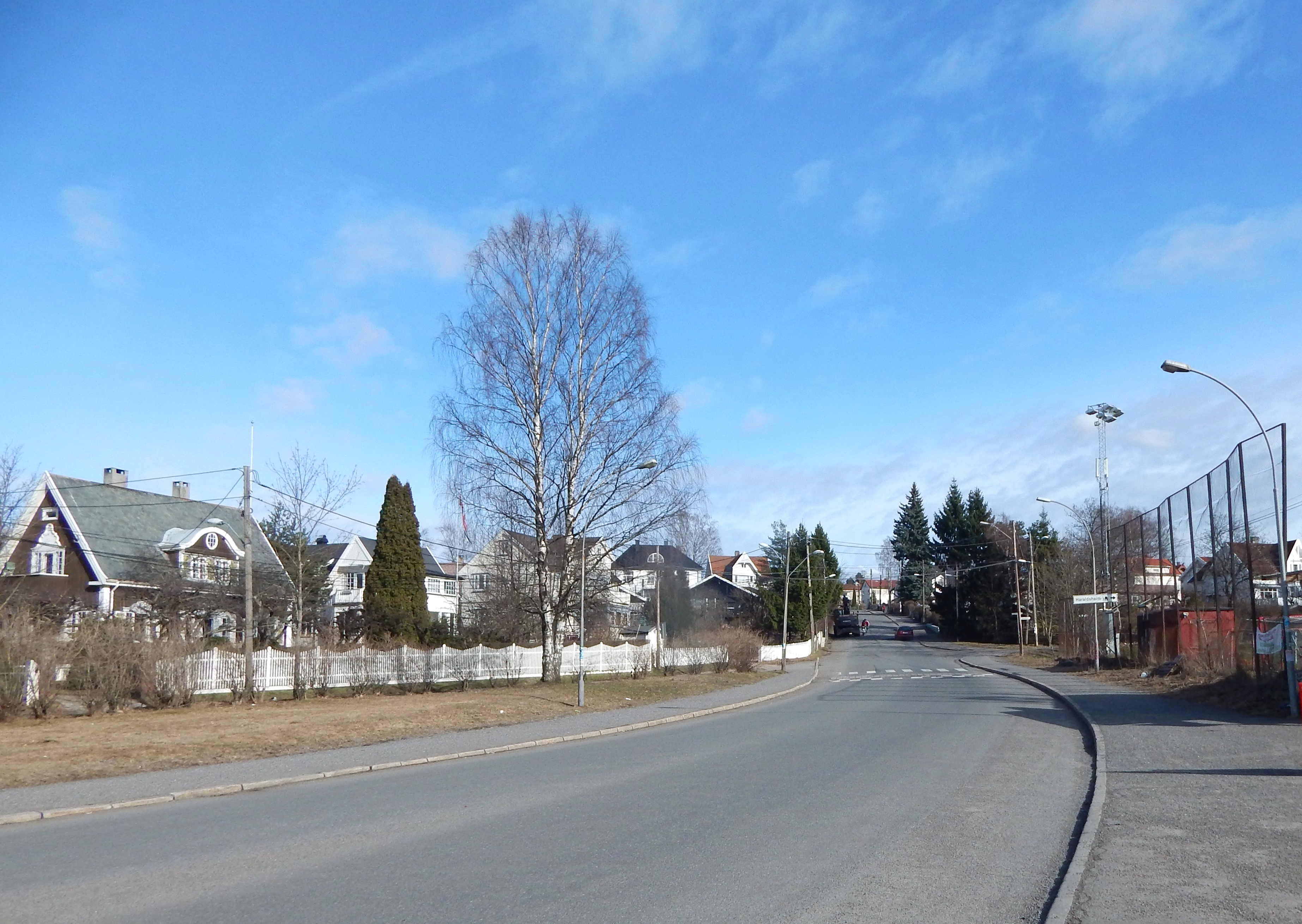 Lofthusveien ved Nordre Åsen